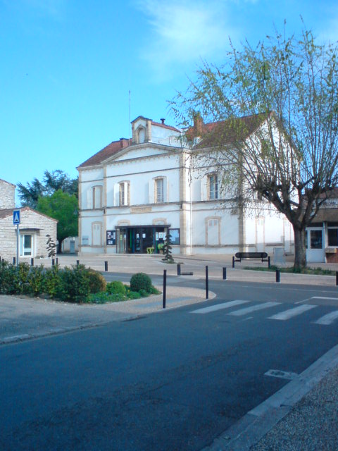 Mairie de la ville du Passage d'Agen